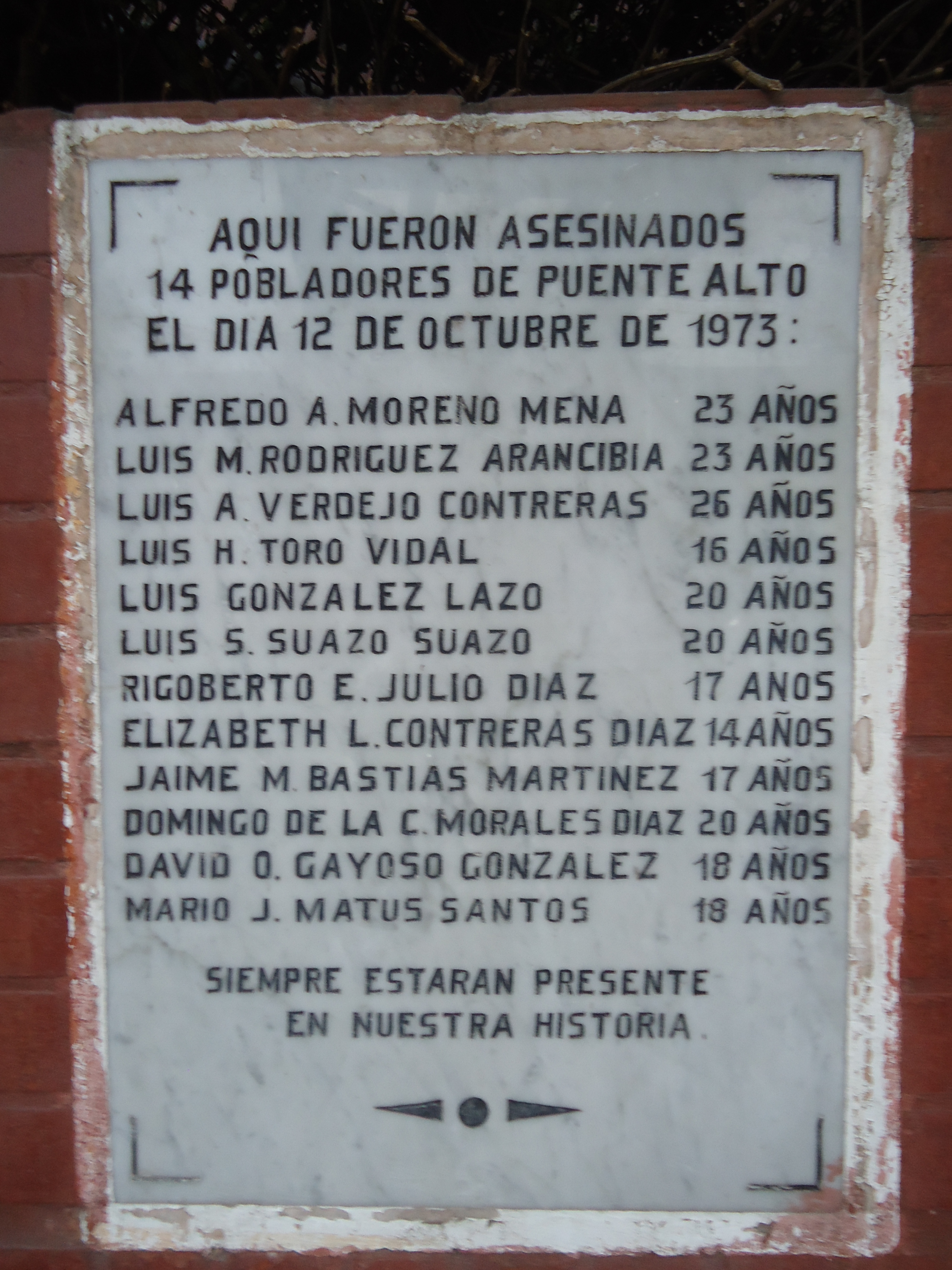 Placa